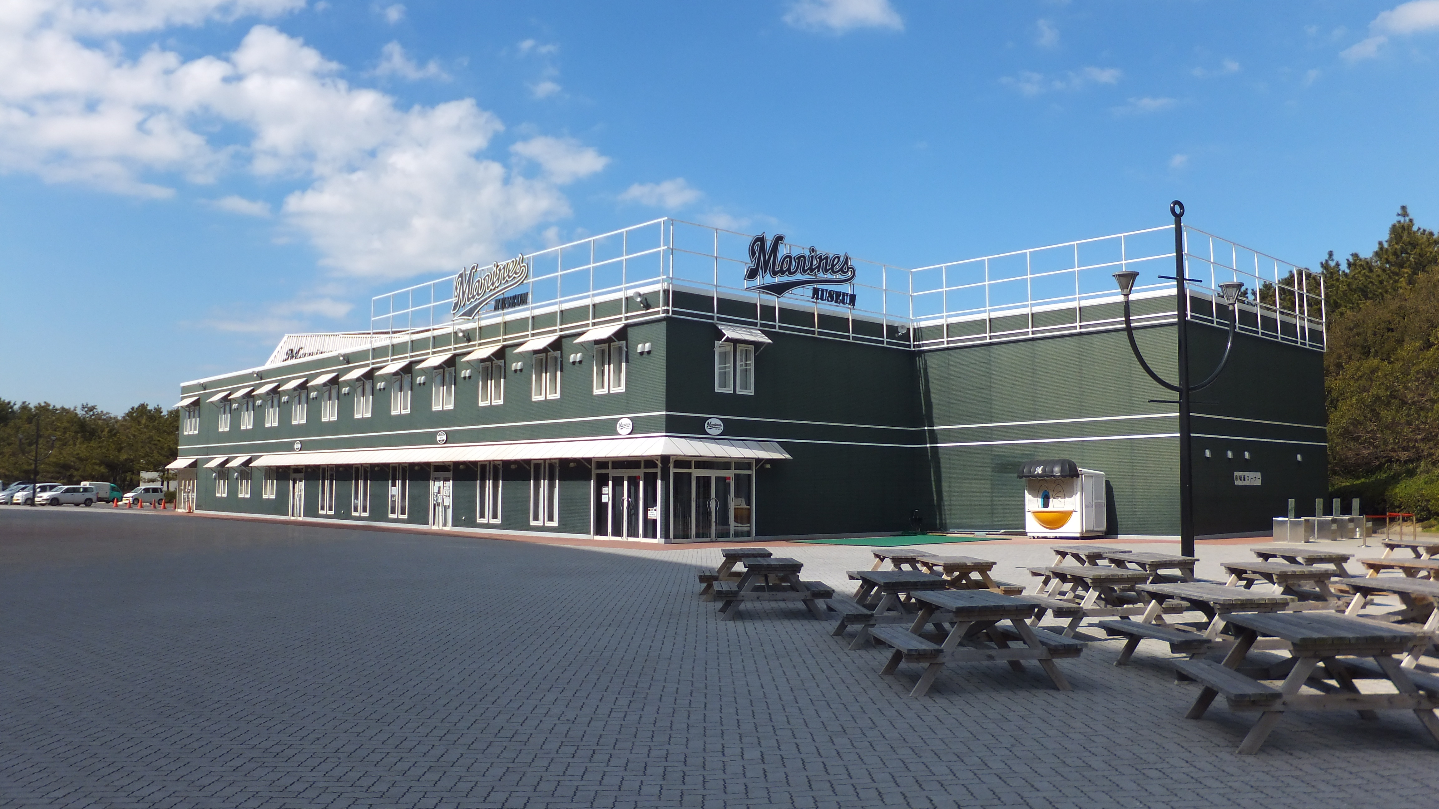 QVCマリンフィールドに隣接したマリーンズ・ミュージアム